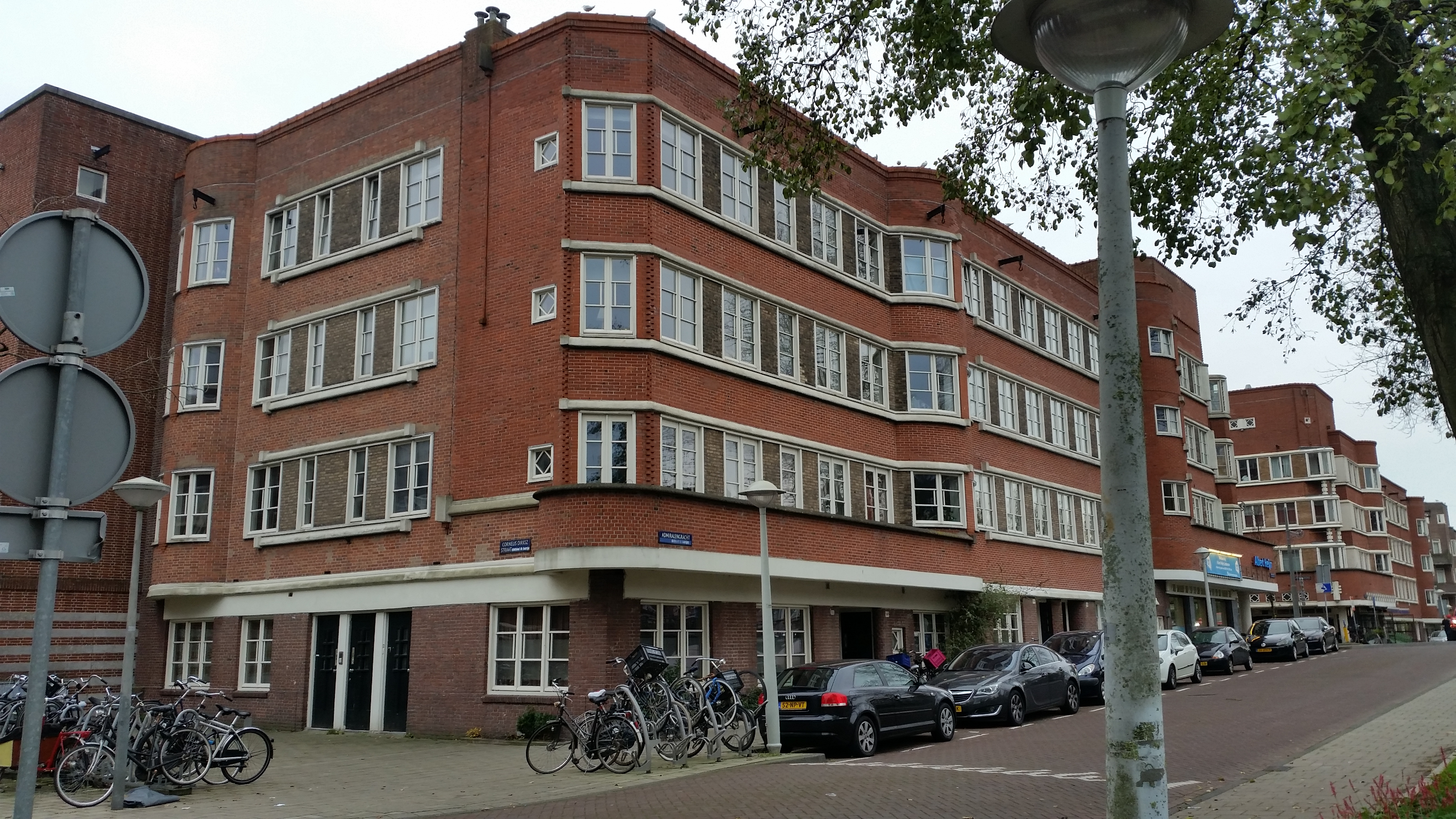 Cornelis Dirkszstraat 2-4, Admiralengracht 180 en lager, Amsterdam